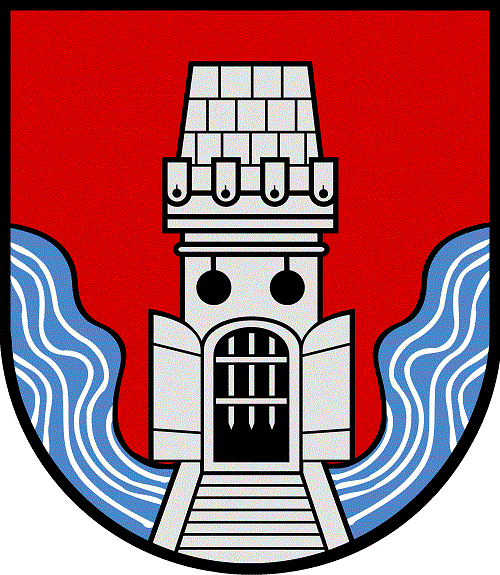 Wappen der Gemeinde Frohnleiten in Österreich